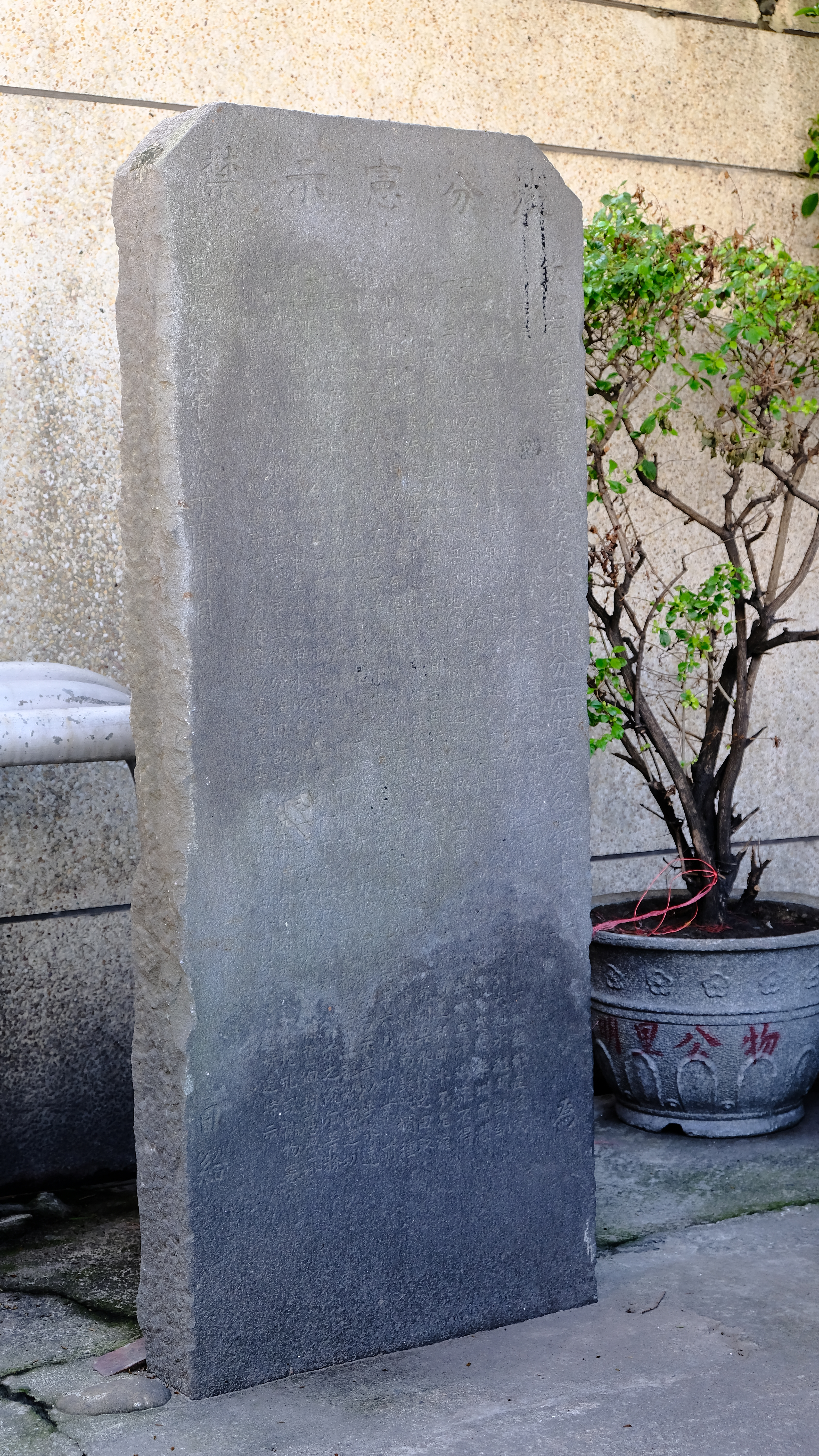 中文（台灣）: 2019 La stèle de BaoYuan Temple 淡分憲示禁 新莊保元宮 淡分憲示禁-嚴禁截流塞狹圳道碑記道光17年(1837年) 碑文 欽加府銜臺灣北路淡水總捕分府、加五級、紀錄十次婁，為勒石示禁，以垂久遠事。 據永安陂圳戶張豐順呈稱：「原自乾隆三十年間，奉前道憲奇、前憲李示諭，開築陂圳接引大溪源流，由潭底庄分灌西盛番界頂下□，經新庄抵武□灣頭、二、三重埔等庄。旱田每甲水立汴，以魯班尺式一寸四方鑿孔長流；年除納大租、水租外，約納工本木料谷三石、四石不等。惟有圳道所由新庄十八份、十九份等田頭經過，當日議定開築，圳面闊一丈三尺，兩傍圳岸闊各四尺，無收地價。每份約送水一甲或二甲，就各份田頭照圳立汴通流，不得增減、亦無租稅，各有立約付據。詎爾來，田多易主，同依舊約，或藉此田水份欲灌別墾新田。水不足灌，則挖汴鑿孔或毀汴截流；甚而不遵按甲立汴，橫埋竹節柴涵，多引圳流盜賣、分灌別無水份之田，取利肥己。且有據溪頭曲防來水，又有築墻擲杙、侵圳阻流；或丟糞土以塞圳道、或藉料船而毀陂欄。種種弊害，理較不听，力爭恐禍；不較不爭，勢必下流乏水，爭灌生端。順經於道光元年六月間，叩蒙前憲胡出示嚴禁在案。第年久示廢、弊害復生，不得不瀝情抄示粘叩，伏乞恩准勒石示禁，以垂永遠。一面差諭各庄業佃遵照前約，按甲立汴，廣清圳道，俾上、下流均分；爭端可息、禍害不生，謳歌載道。切呈」等情。 據此，除批示外，合行出示嚴禁。為此，示仰永安陂圳管下各佃戶人等知悉；自示之後，□等務須遵照前業佃公議約。據而定甲立汴，每甲水以魯班尺式一寸四方為例，不論新頂舊佃，均應照承管田業契約約原配水額，甲數若干，按甲立汴分灌田畝。毋許仍前橫用竹節柴涵截流挖孔或擲物塞狹圳道，藉端爭較。如敢故違，許該圳戶指稟，以憑差拏究辦。事關農田水利，各宜凜遵，毋違！特示。 道光拾柒年歲次丁酉肆月 日給。